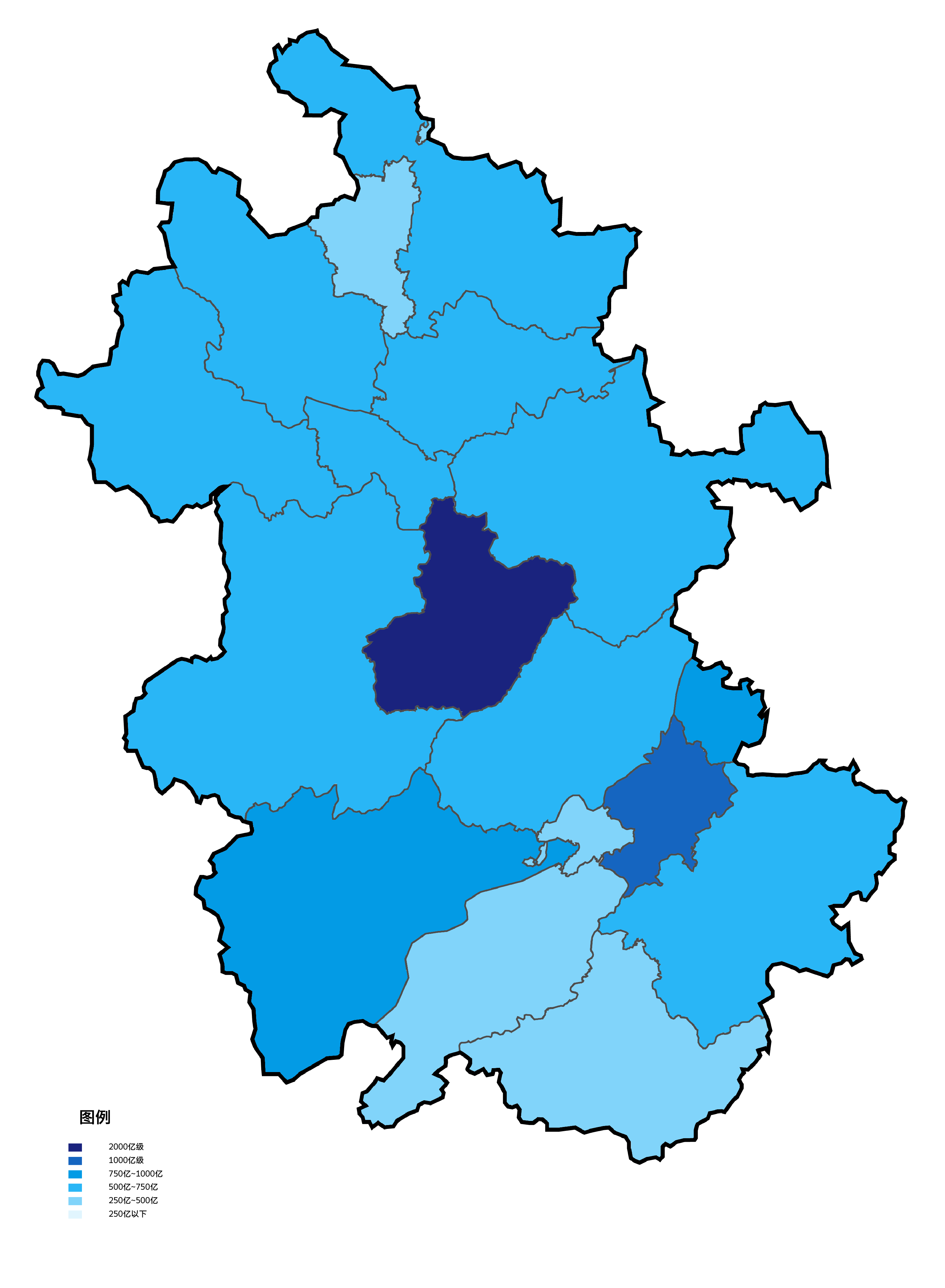 中文（中国大陆）: 安徽省各地级市根据2010年地区生产总值填色地图